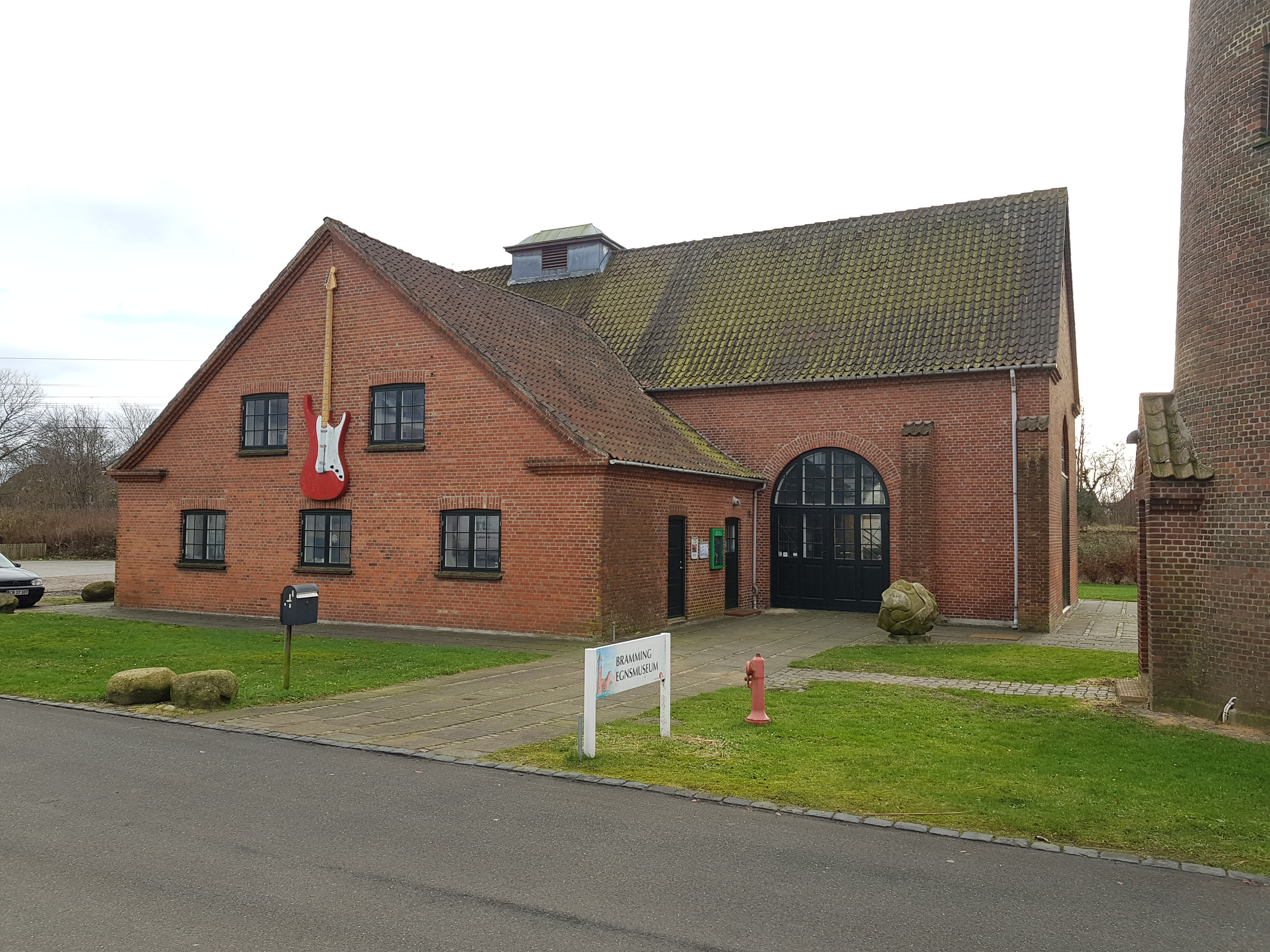 Bramming Egnsmuseum